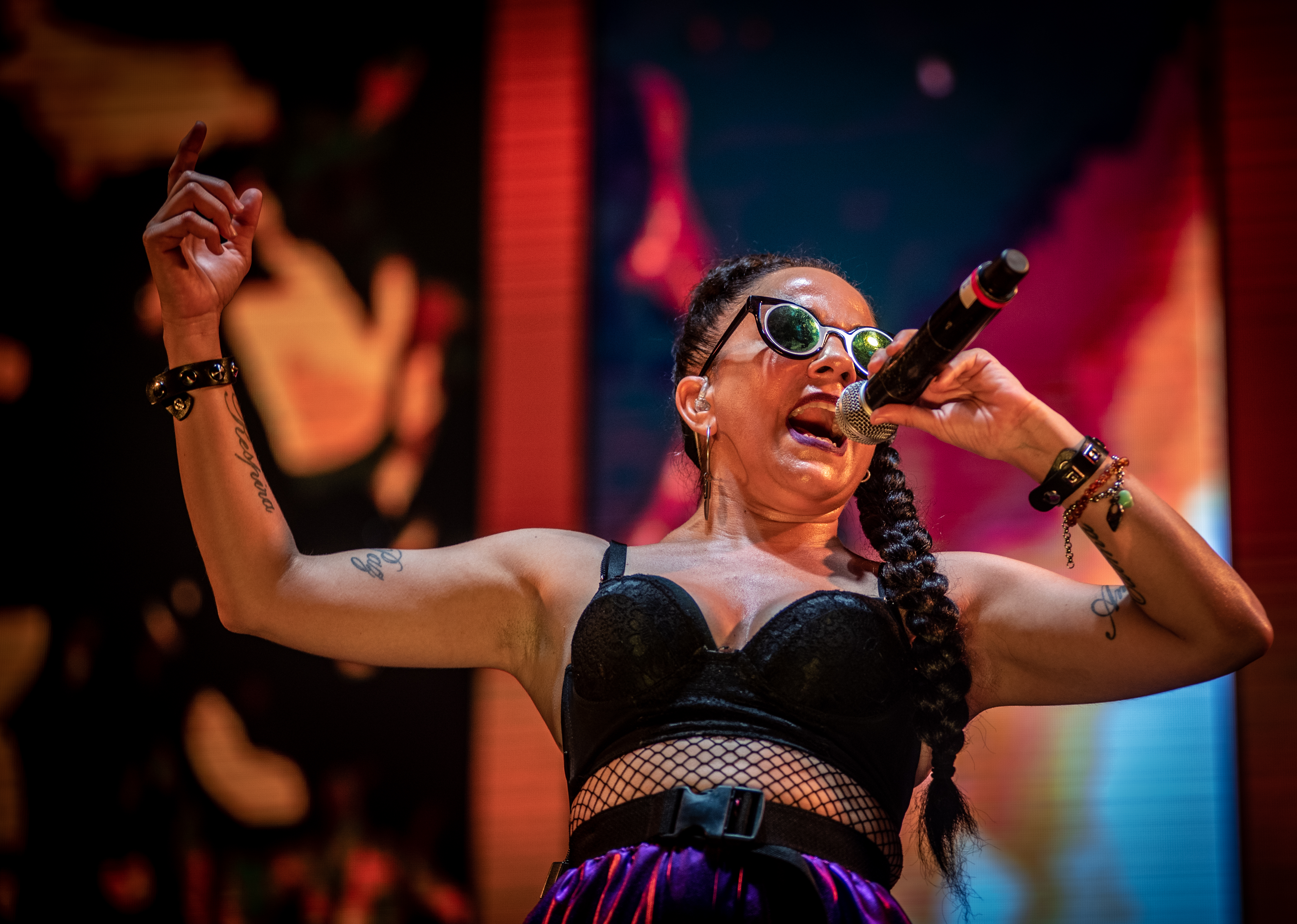 Villa Martenilli, 1 de marzo de 2020._ Más de 500.000 personas se acercaron a Tecnópolis durante estos diez días de Atardeceres con propuestas para todos los gustos y para toda la familia. El broche de oro fue un cierre espectacular que dio inicio a las actividades organizadas por la Semana de las Mujeres Trabajadoras bajo el lema "Nosotras movemos el mundo". La ministra Elisabeth Gómez Alcorta, titular del Ministerio de Mujeres, Géneros y Diversidad, recorríó el predio junto a María Rosenfeldt, directora de Tecnópolis. Fotos Kaloian y Augusto Starita/ Ministerio de Cultura de la Nación.